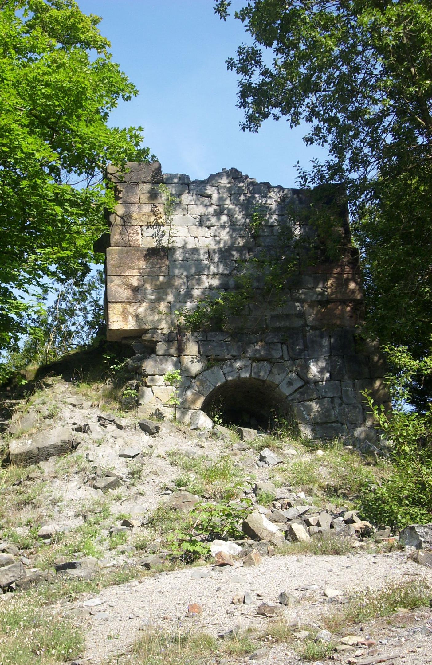 Bauwerksrest der ehemaligen Bleihütte Clausthal im Westen von Clausthal-Zellerfeld